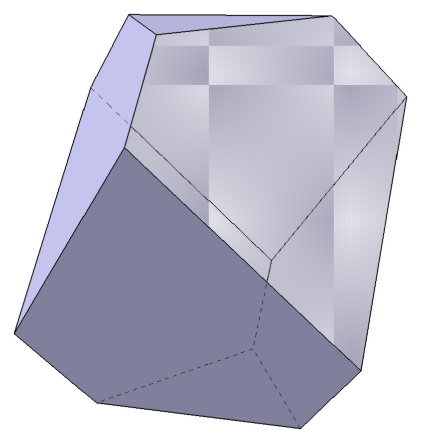 3D-Ansicht eines Rhomboederstumpfs („Duerer-Polyeder“)